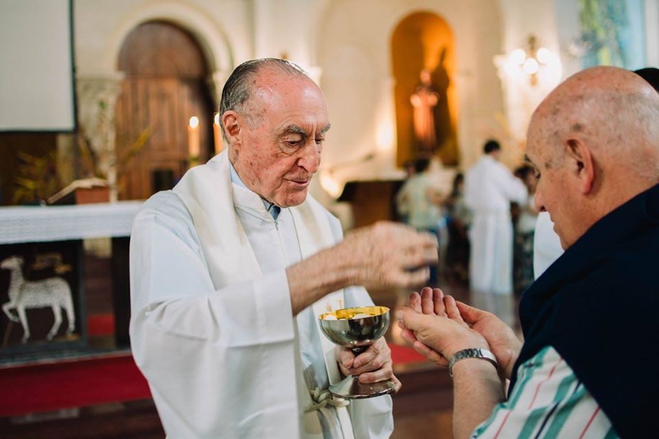 Fundador del Movimiento de la Palabra de Dios